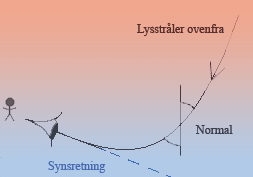 Fritt etter originalbildet laget av Albert Jimenez på engelsk Wikipwedia.